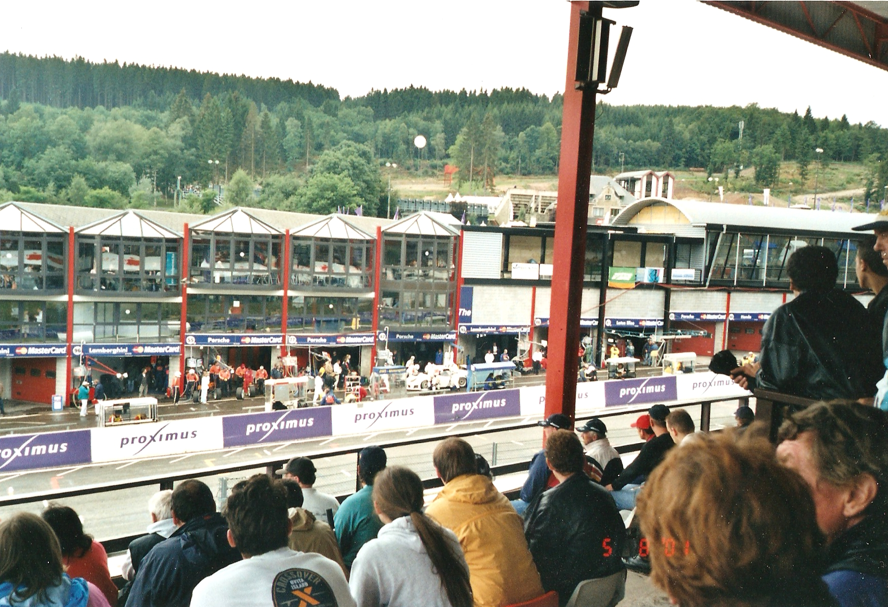 24h Spa 4/5 aug 2001